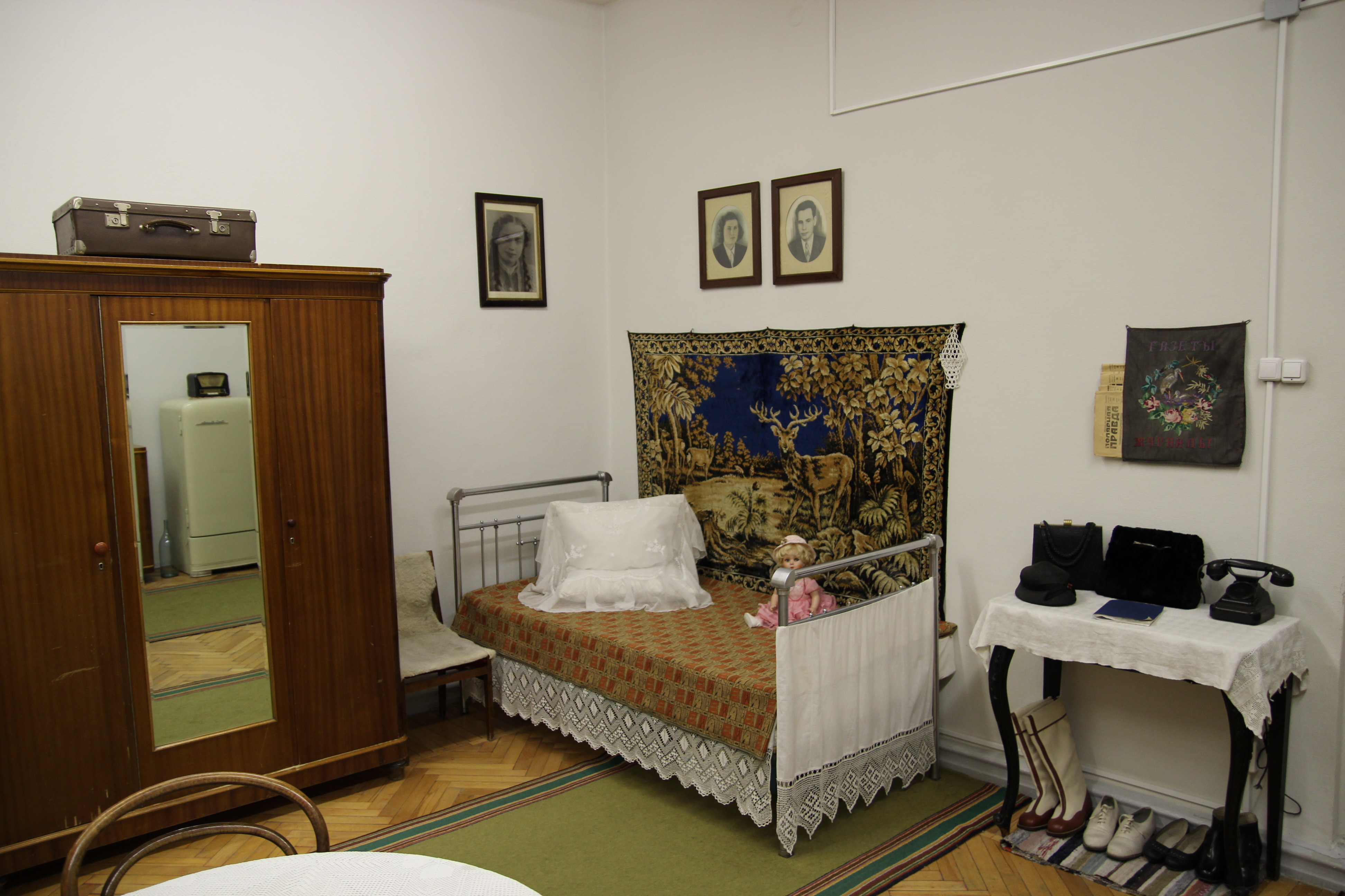 Интерьер комнаты 50-х годов 2